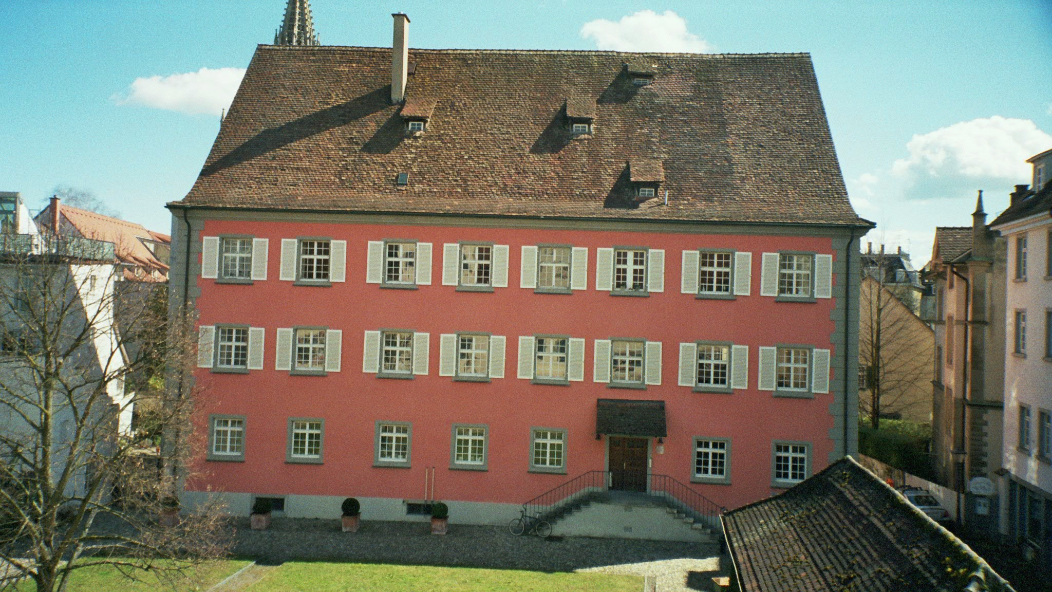 Kleinspitäle, vormals Bischöfliches Spital, in D-78462 Konstanz, Torgasse 6. Heute Gebäude der Staatsanwaltschaft Konstanz.